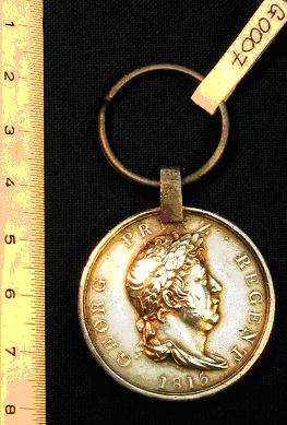 Waterloo Medal Avers